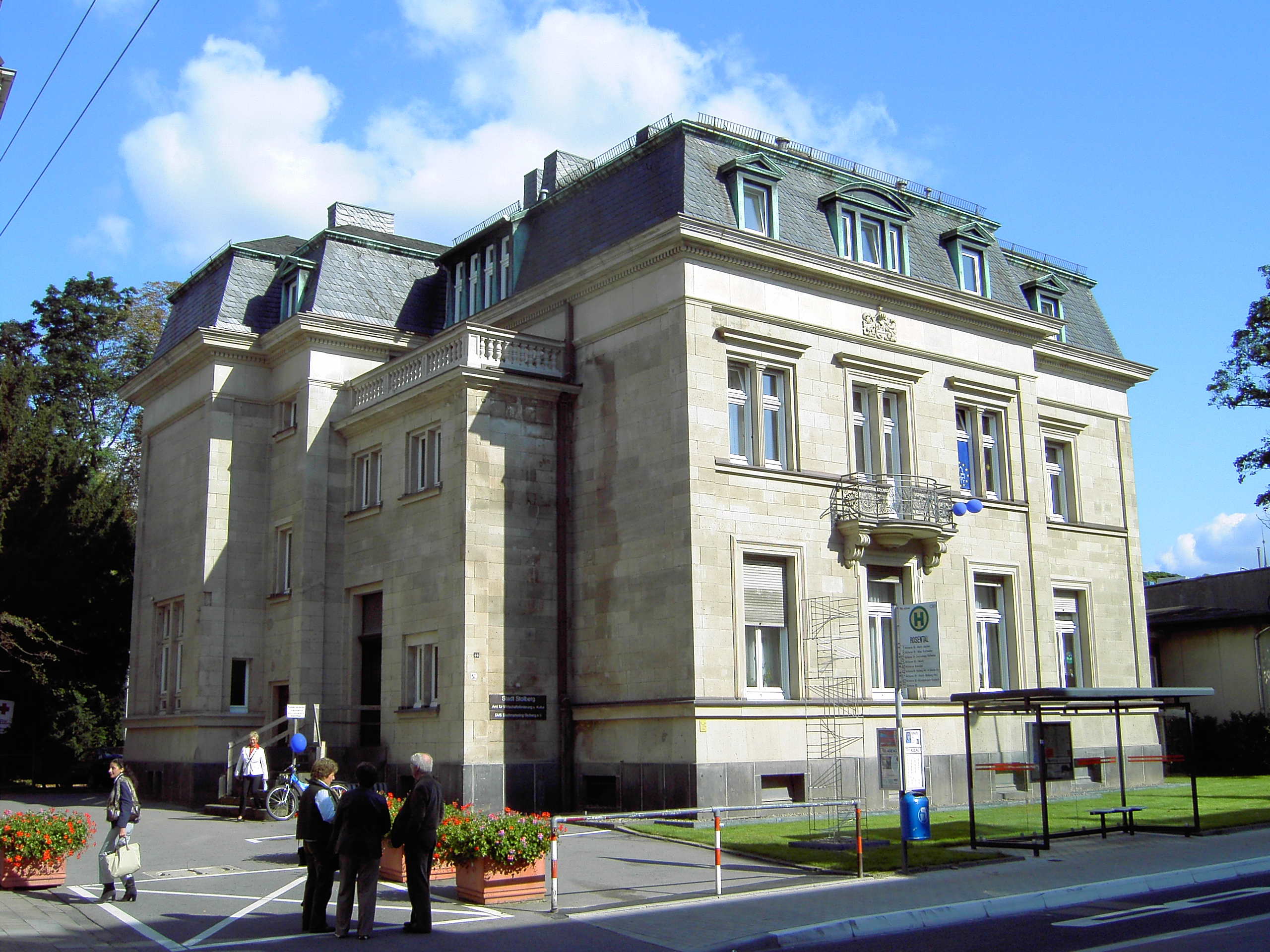 Villa Lynen in Stolberg